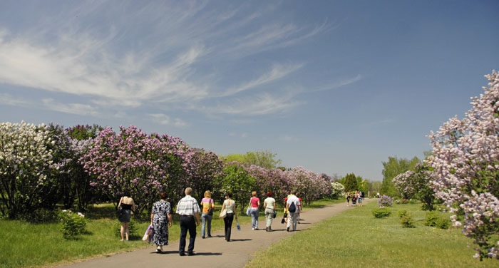 Колекцыя бузку Криворізького ботанічного саду НАНУ: Квітування бузку 2010